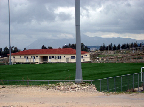 Andreas Kanistras Groud Patra Greece Γήπεδο ΕΠΣ Αχαΐας Ανδρέας Κάνιστρας